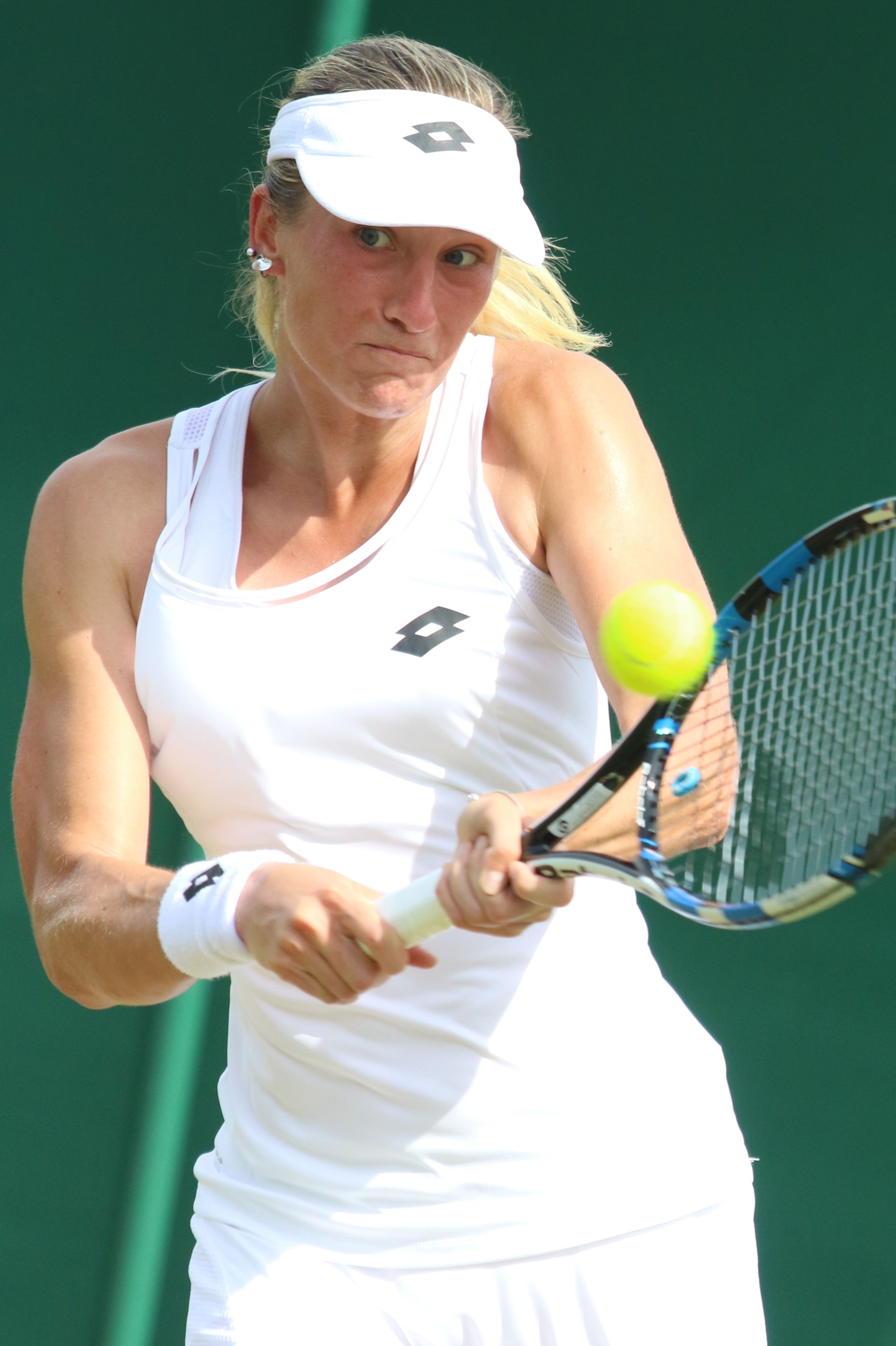 Allertova WM17 (5)